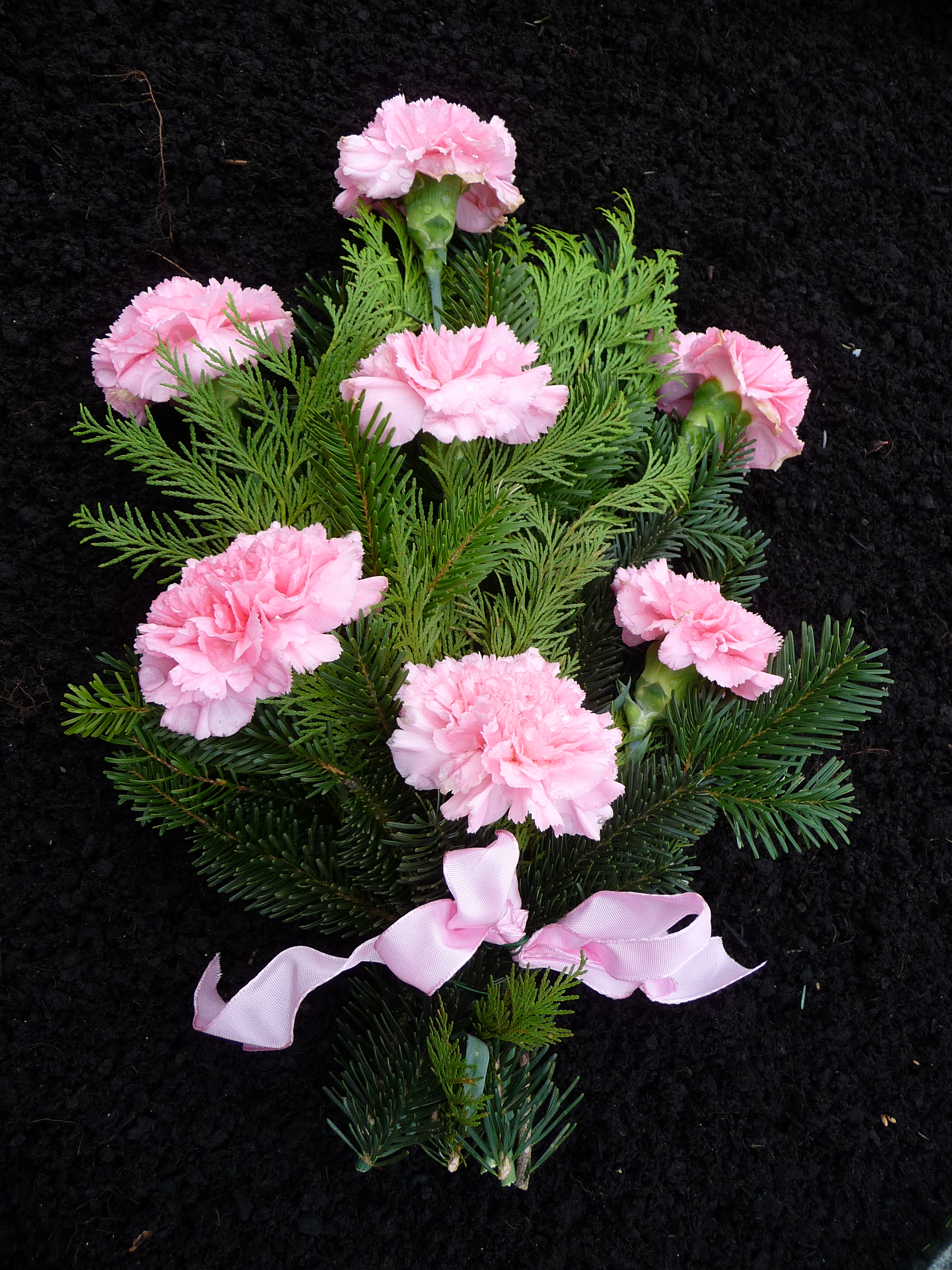 Strauß mit rosanen Gartennelken als Grabschmuck